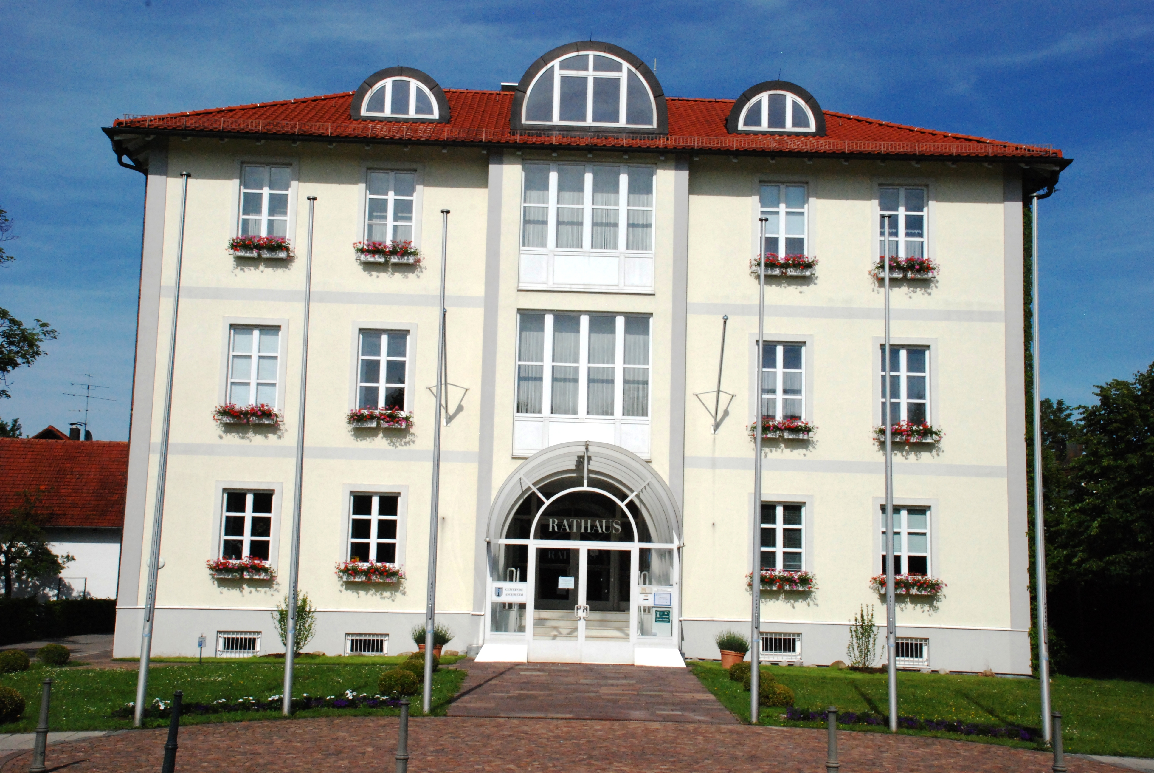 Rathaus der Gemeinde Aschheim, Landkreis München